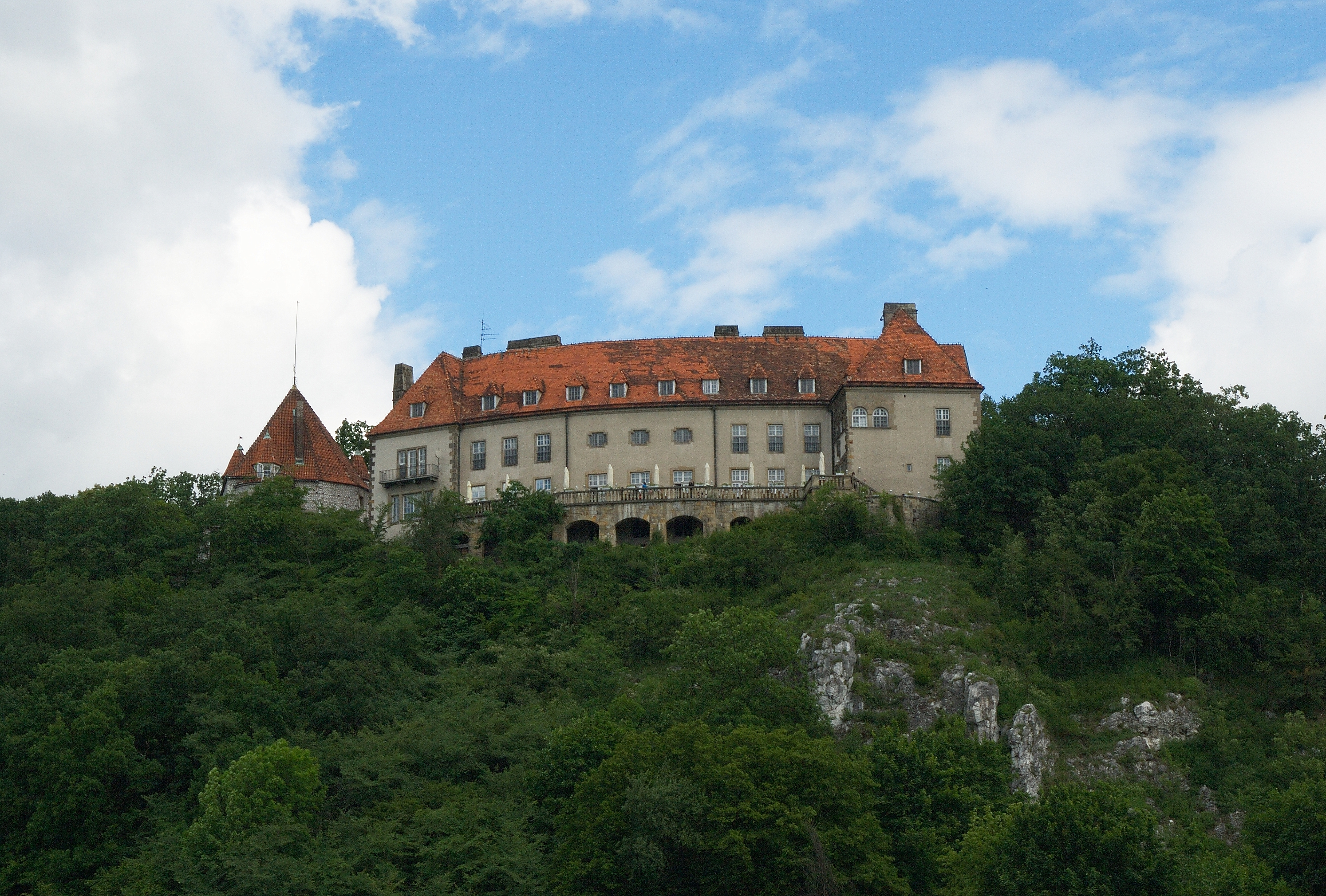 Willa Rotunda, Przegorzały